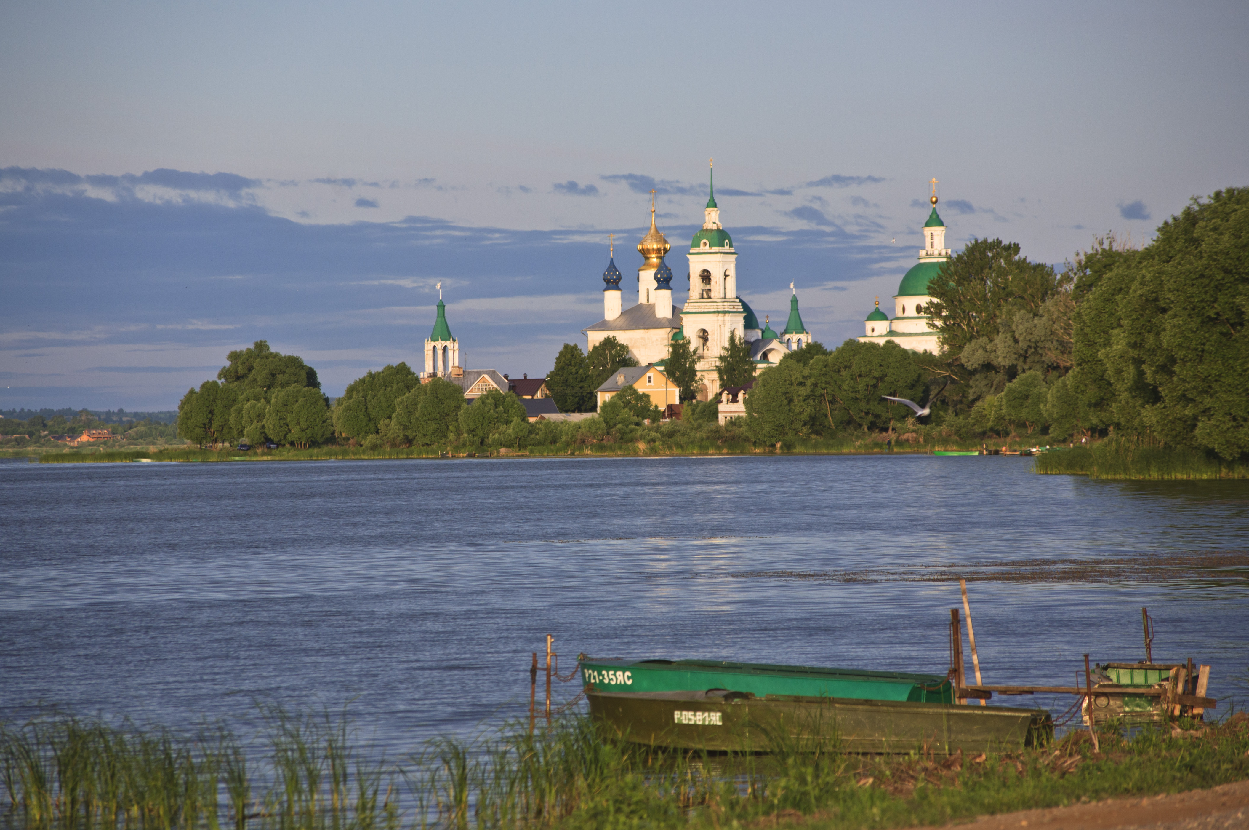 Озеро Неро: Кюго-востоку от г. Ростов,Ростов Великий,Ростовский район, Ярославская область This image is related to the protected area of Russia number 7610328